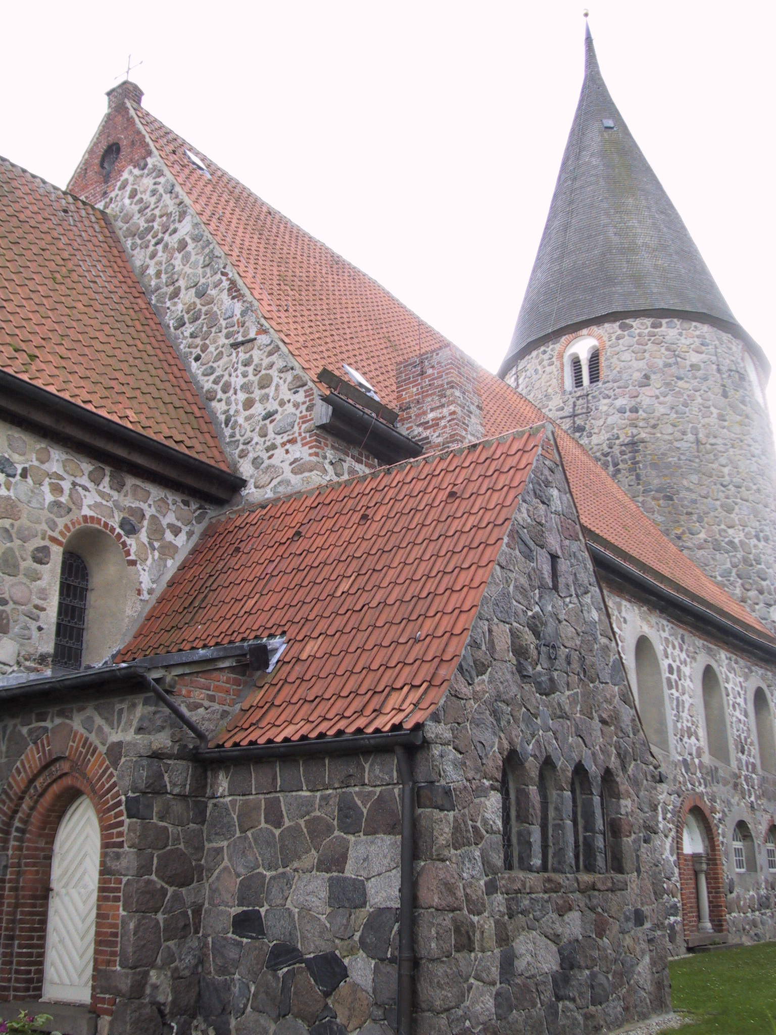 Die Feldsteinkirche Ratekau Sonstiges: ...